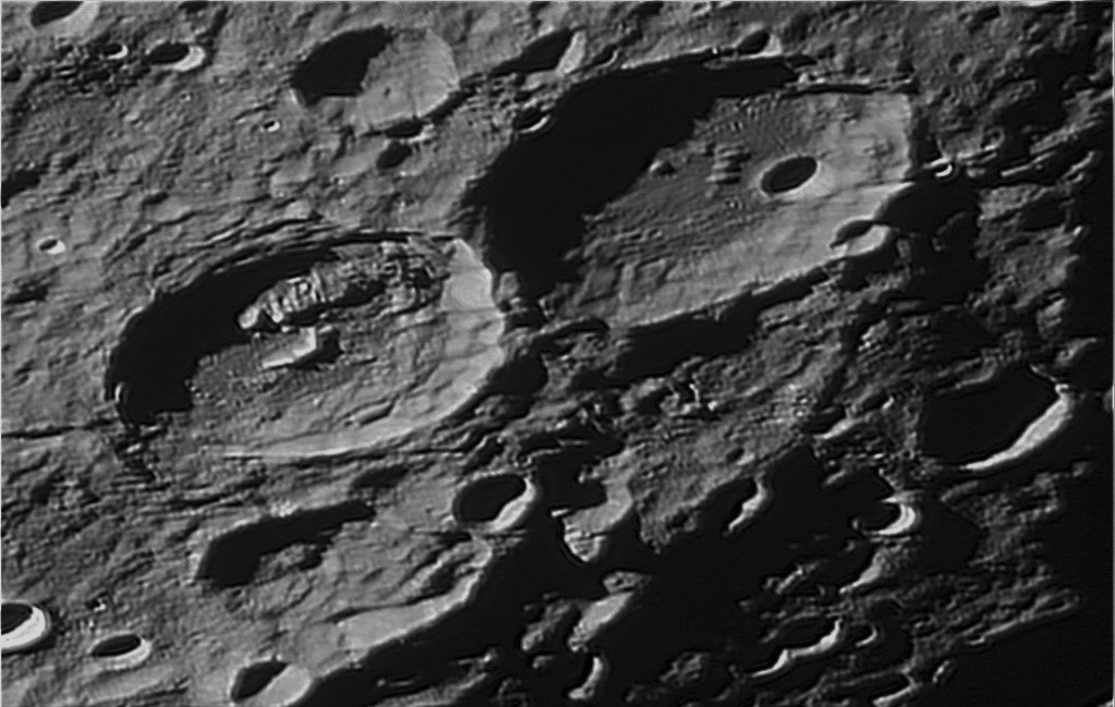 梅修斯及法布里休斯环形山照片